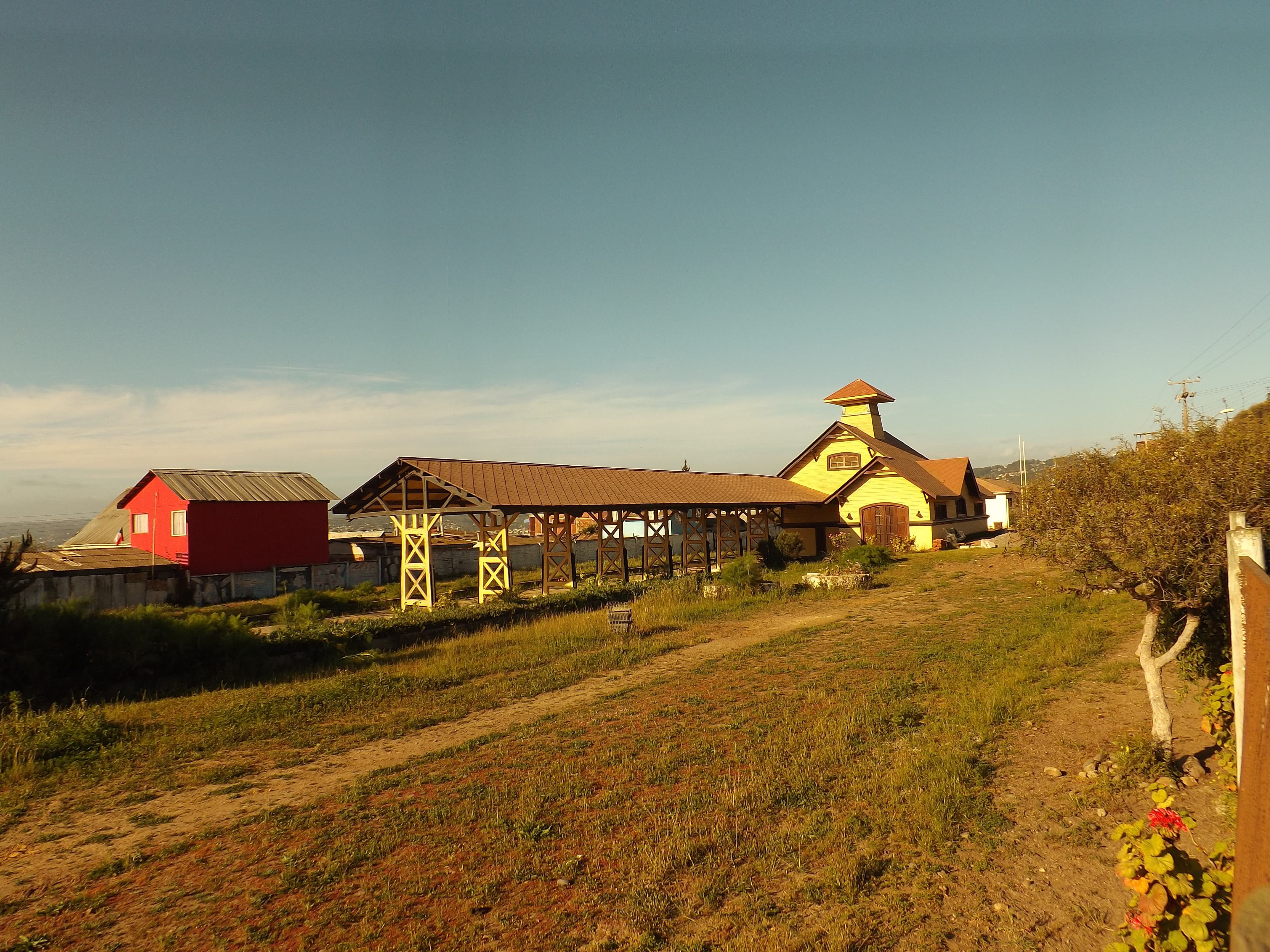 Estación de ferrocarriles de Cartagena This is a photo of a national monument in Chile: 781